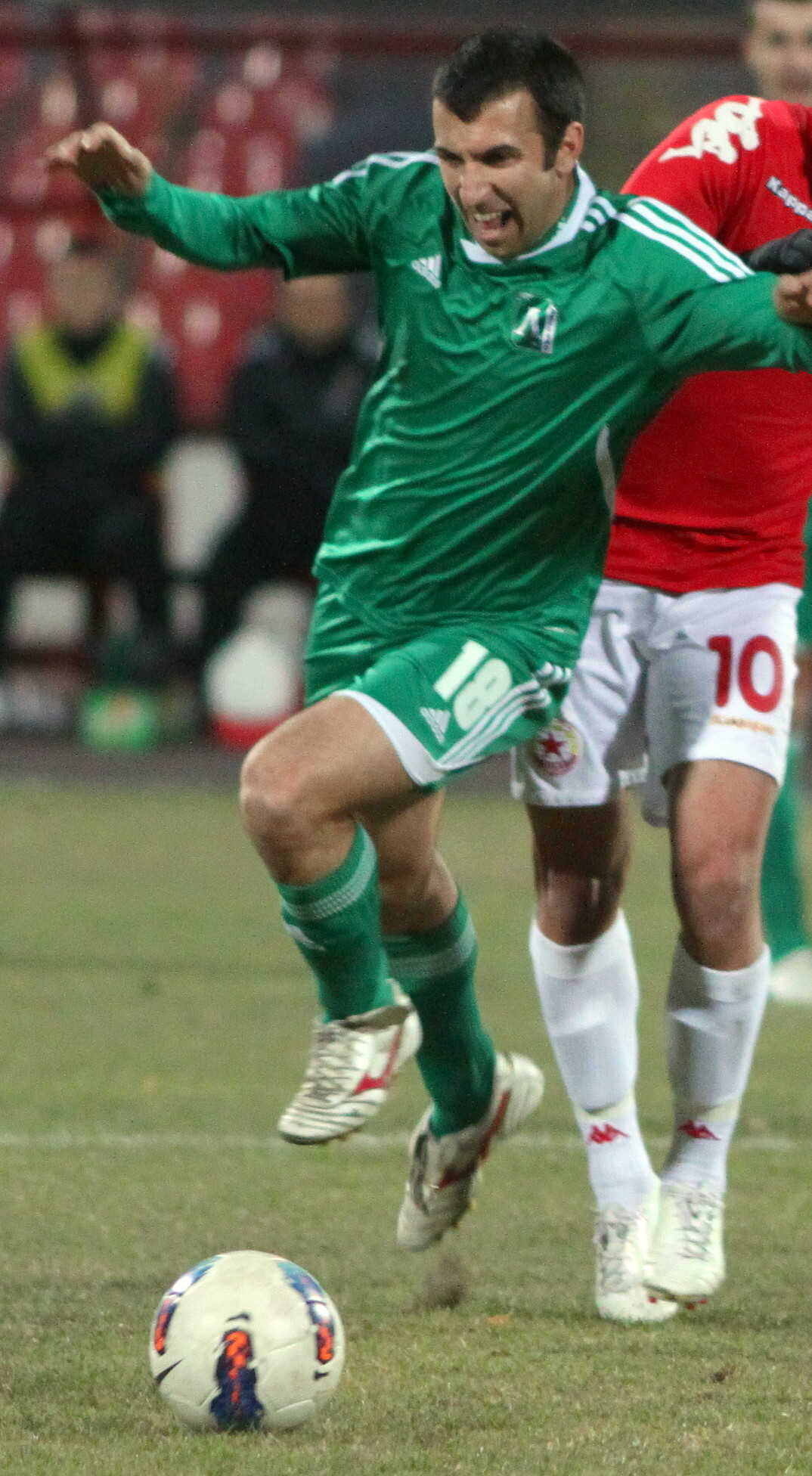 Светослав Атанасов Дяков е български футболист, който от юни 2011 г. се състезава за отбора на ПФК Лудогорец 1945 (Разград). Юноша на Пирин (Бл).